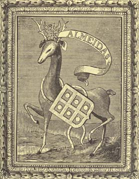 Gravura das armas dos Almeidas, do 2º vol. do livro "Brasões da Sala de Sintra" (1ª ed. 1921), do historiador e genealogista Anselmo Braamcamp Freire (1849-1921)